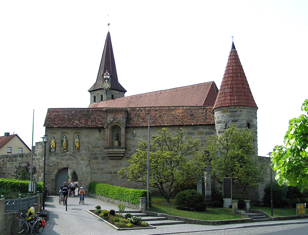 Description: Kirchenburg in Effeltrich, Landkreis Forchheim, Upper Franconia (Germany) Date: 12. Mai 2006 Author: --Schubbay 13:46, 26 August 2006 (UTC)-- Other versions: none